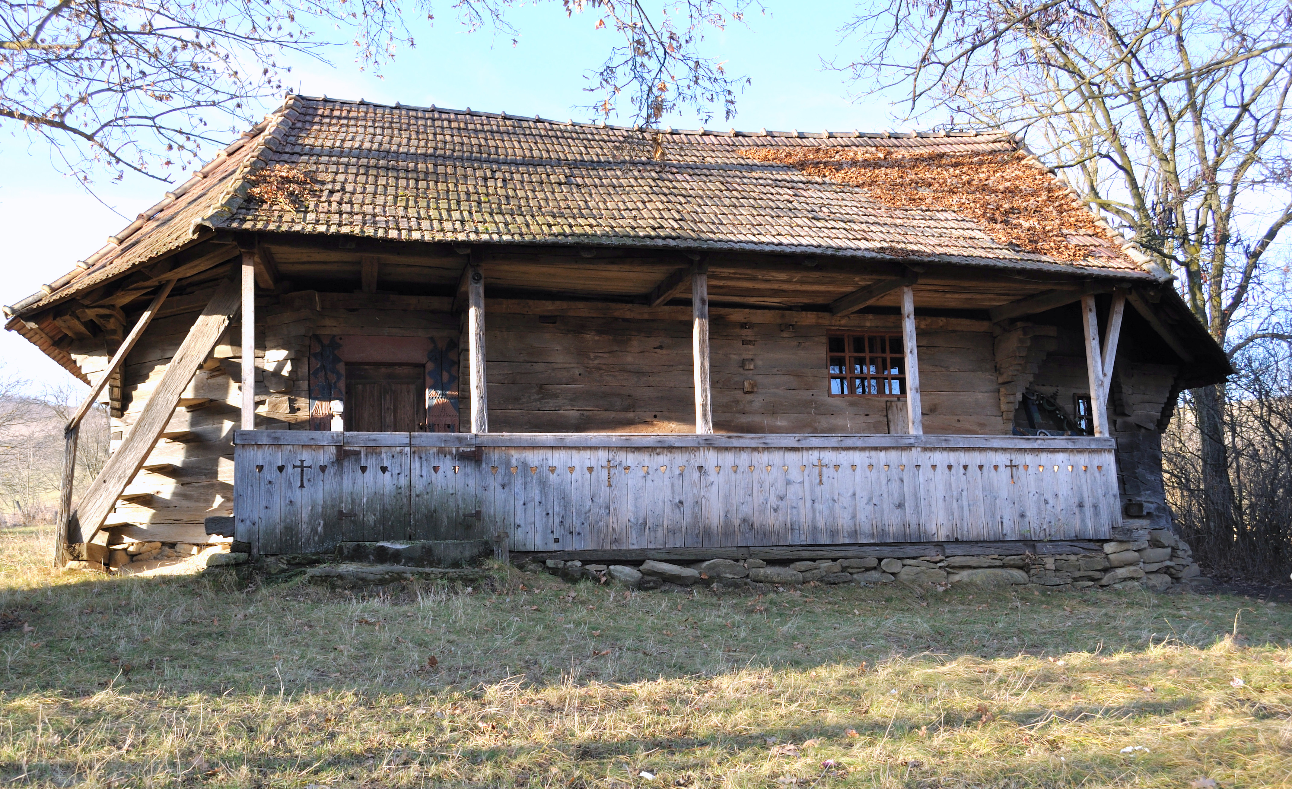 Biserica de lemn „Sfinții Arhangheli” din Fânațele Silivașului, județul Bistrița-Năsăud